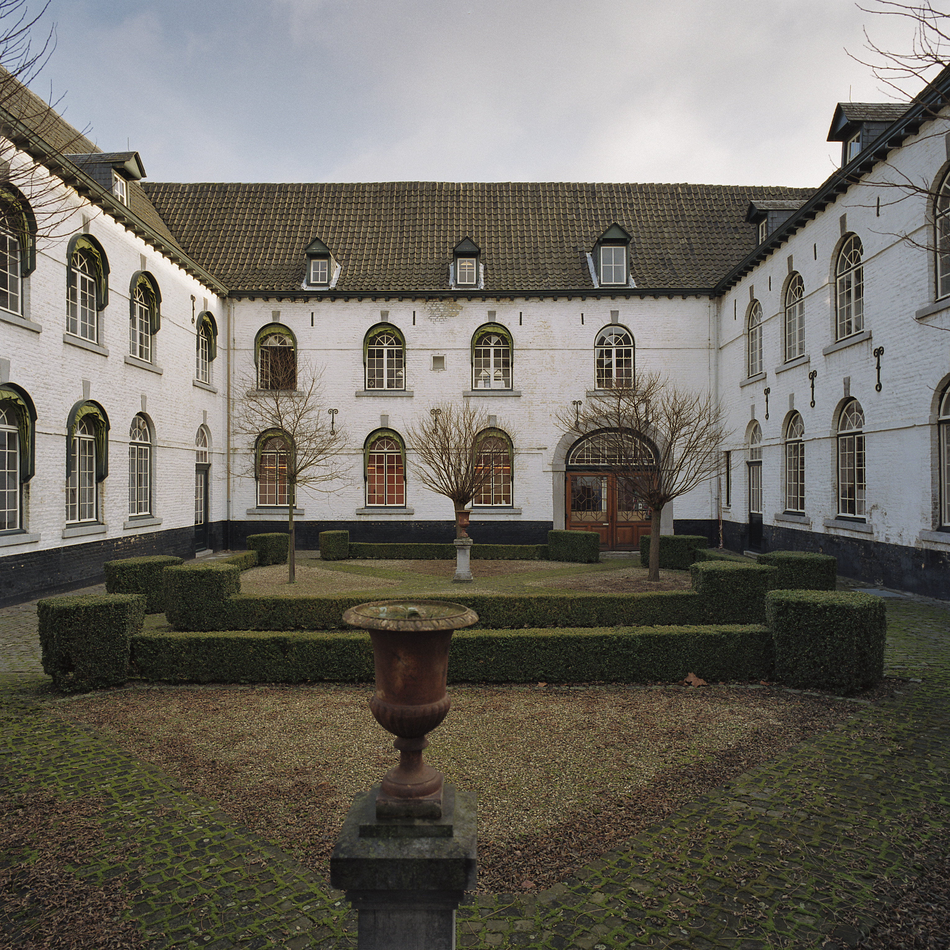 Voormalig Klooster De Nieuwenhof: Overzicht gevels binnenplaats